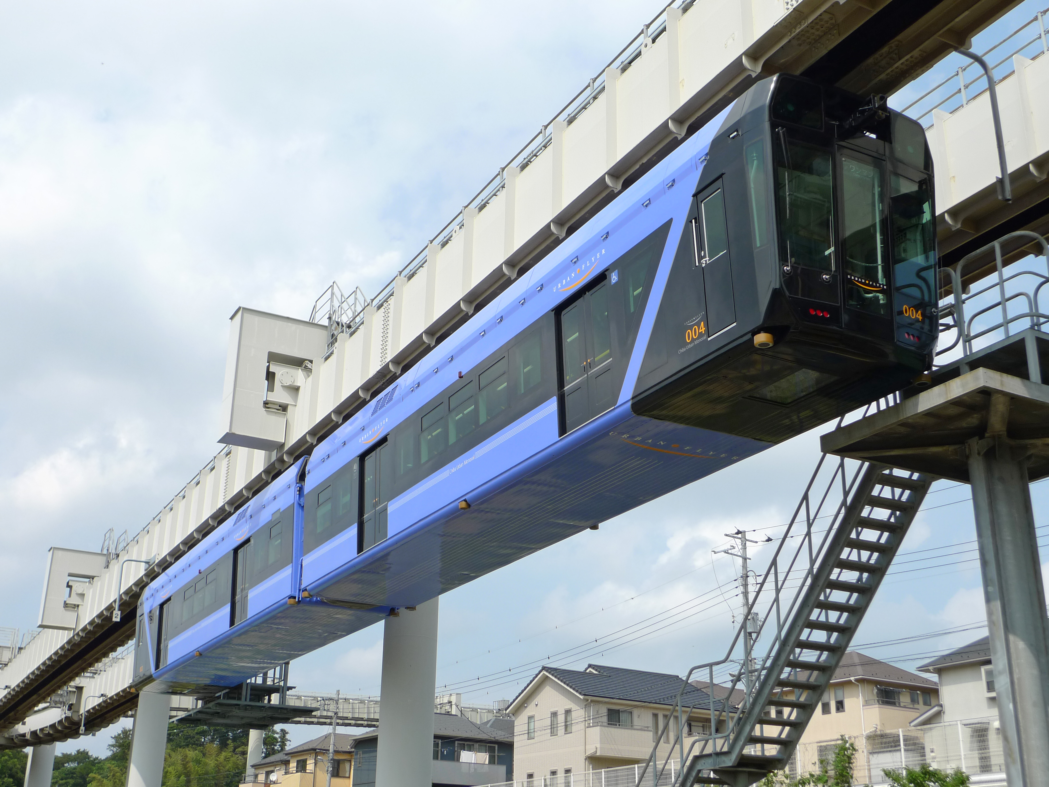 千葉都市モノレール0系 萩台車両基地にて許可を得て撮影